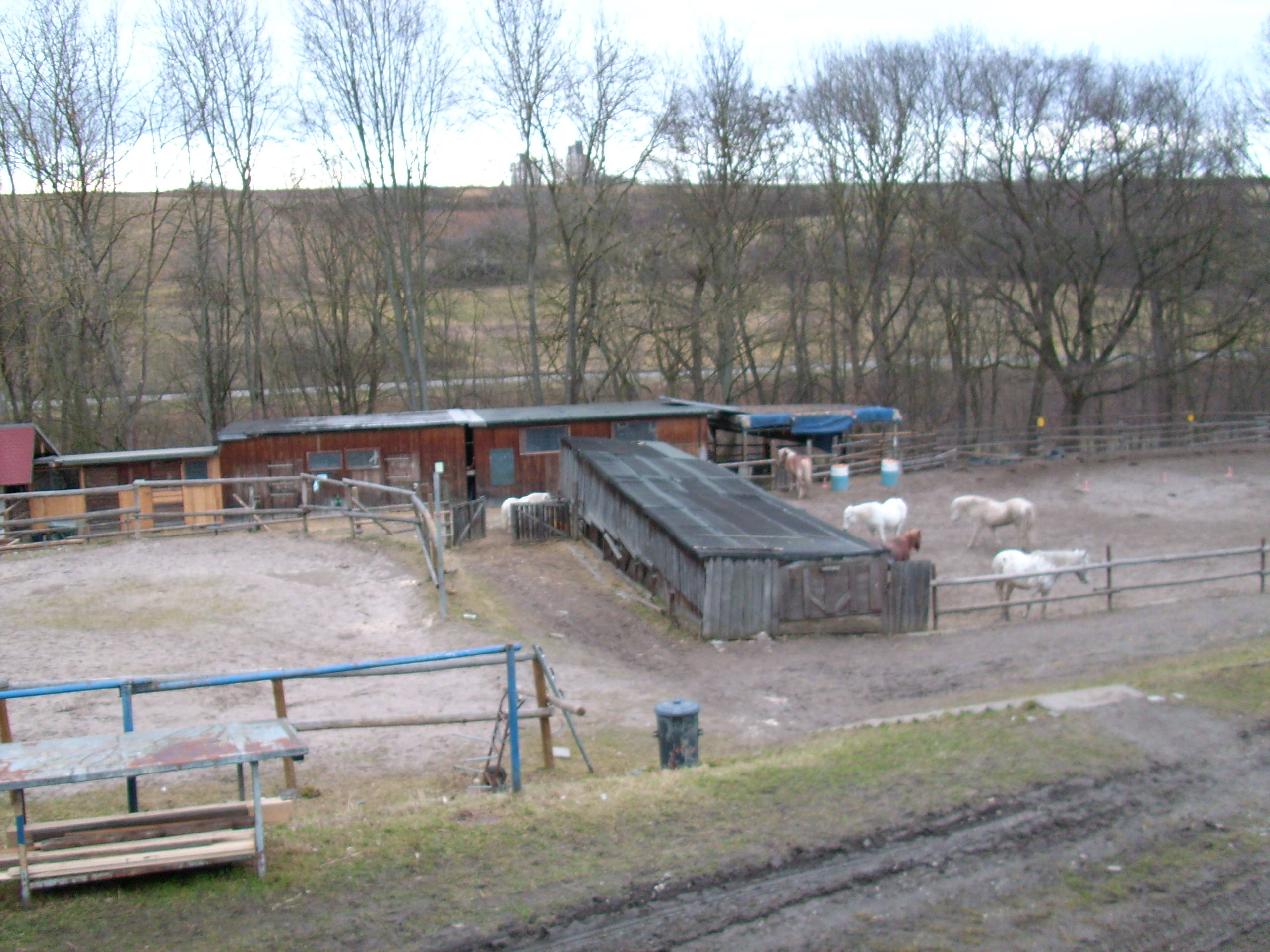 Jugendfarm Freiberg (Stuttgart)